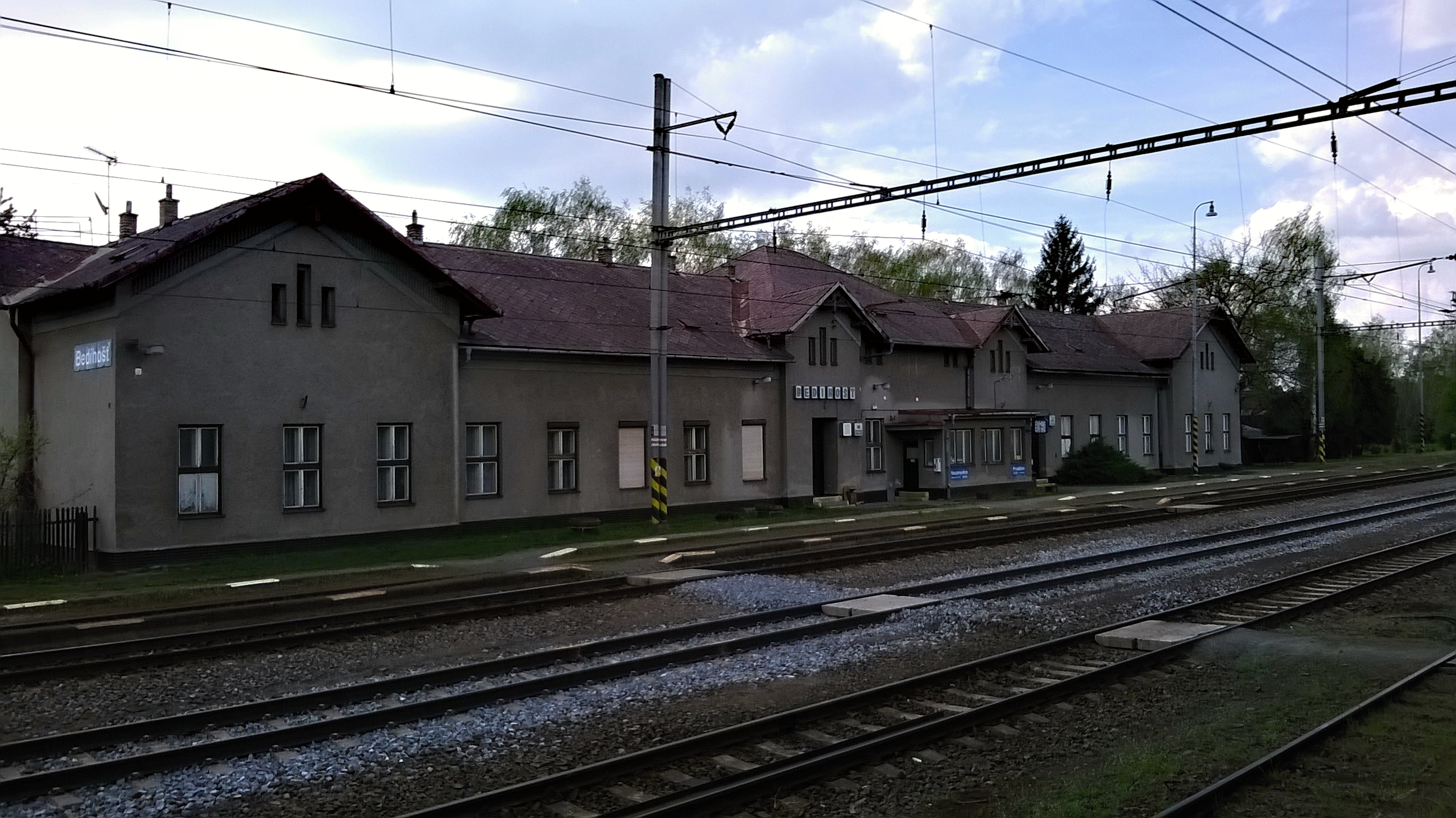 Bedihošťské nádraží